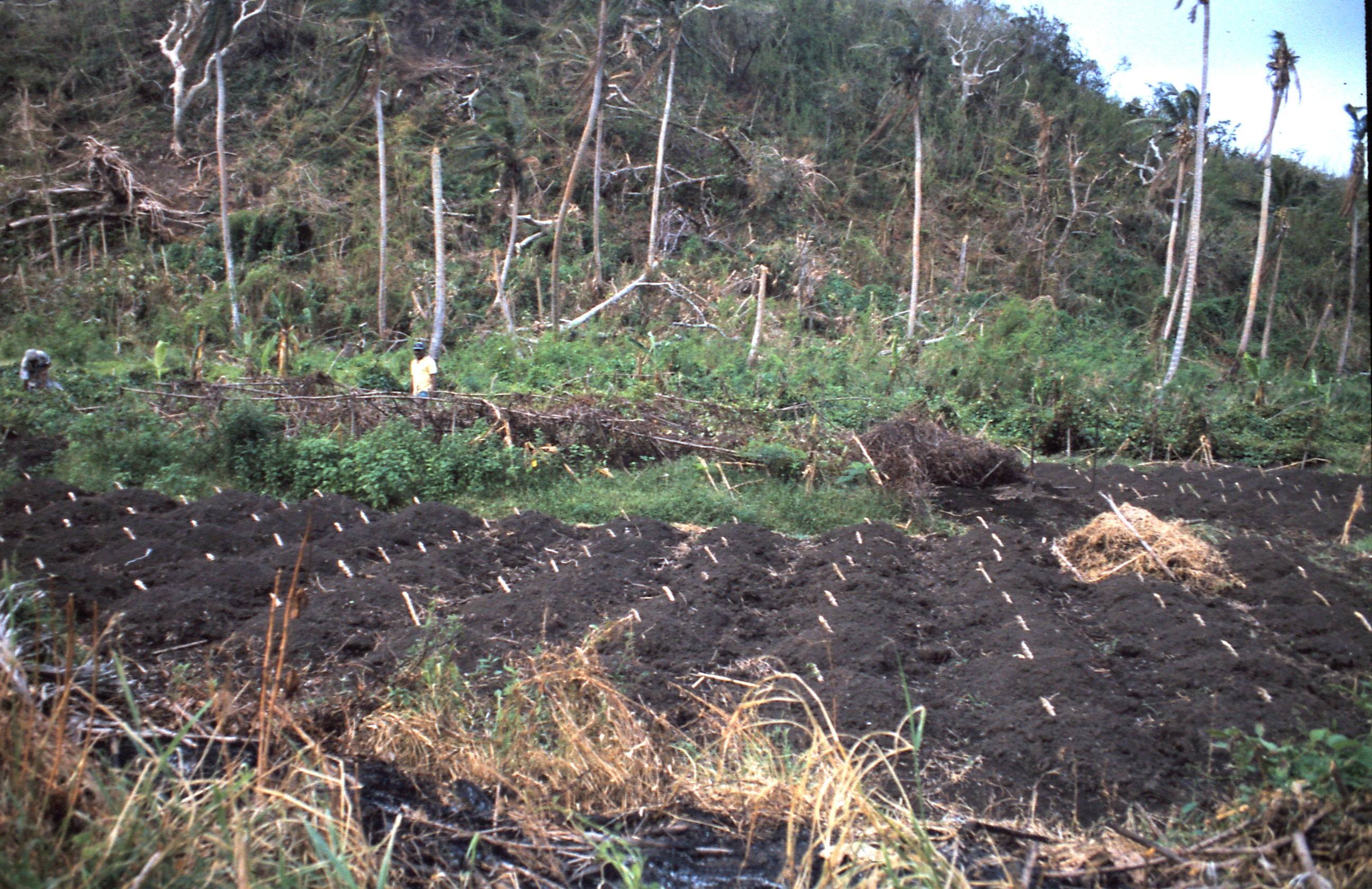 Maniokfeld auf der Insel Yasawa, Fiji